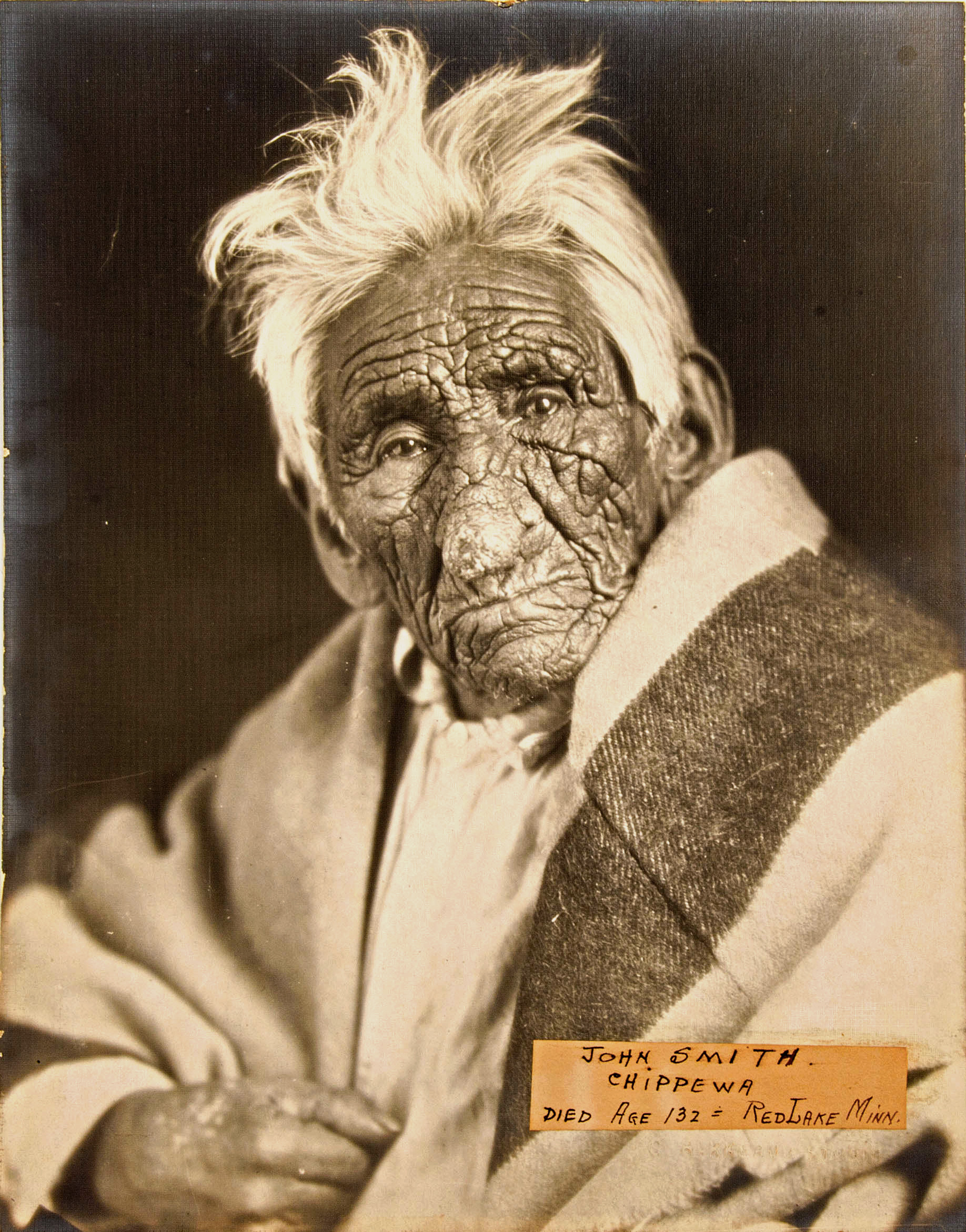 John Smith / Chippewa / Died Age 132 = Red Lake Minn.